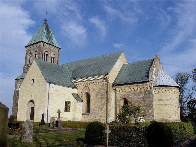 Bjäresjö kyrka i Skåne, Sverige. Bjäresjö kirke